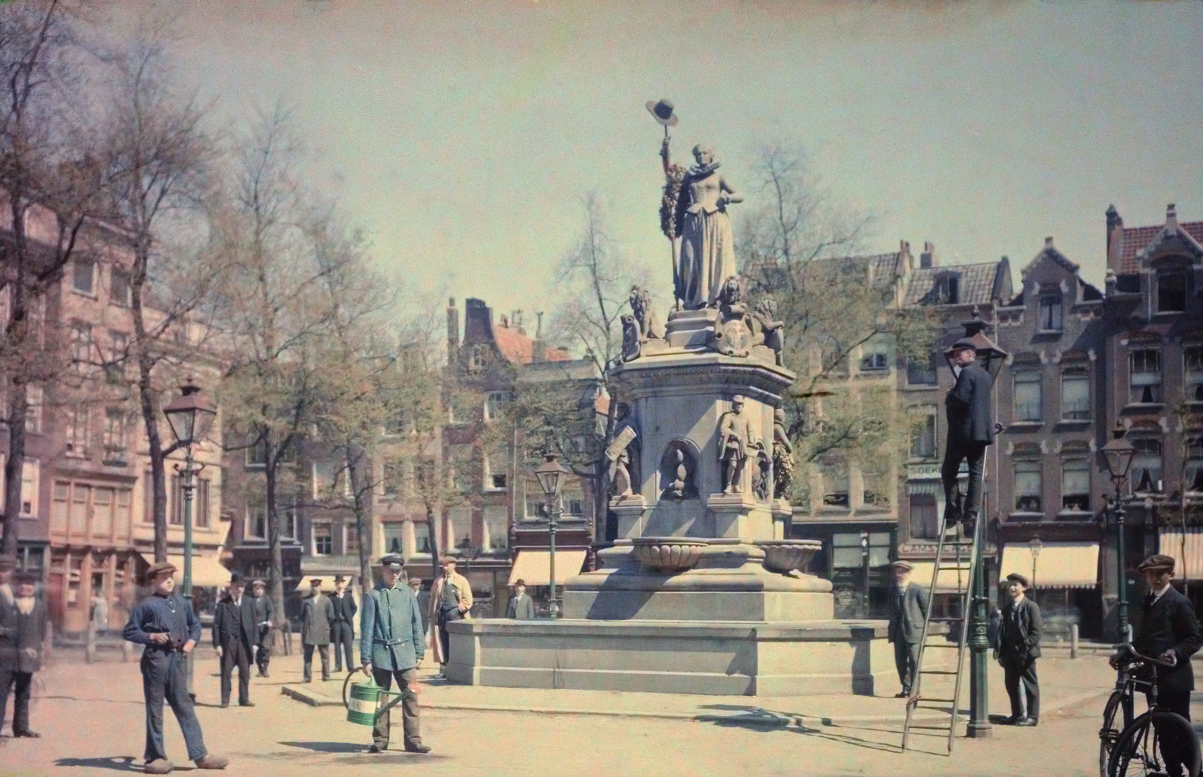 Standbeeld Maagd van Nederland, Nieuwe Markt, Rotterdam autochrome kleurendia op glas 90 × 120 mm 1915